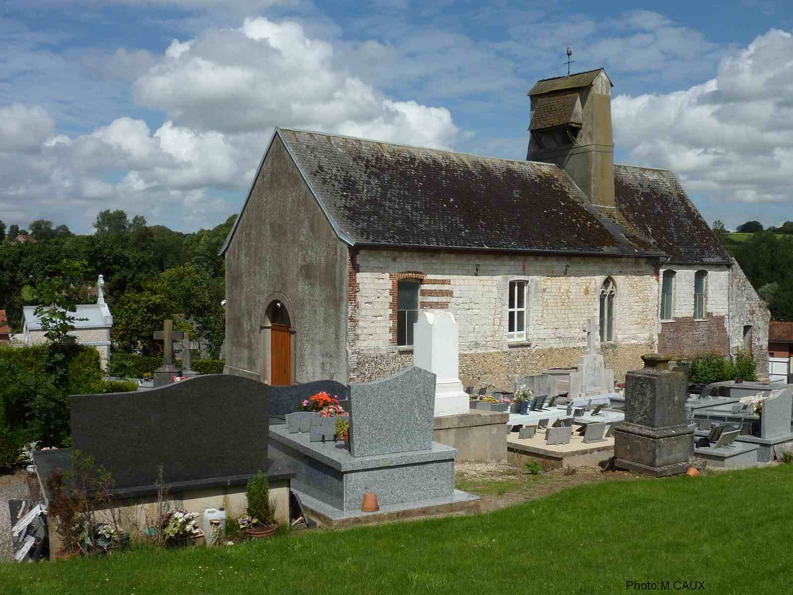 L'église à campenard de Rumilly-Beaussart